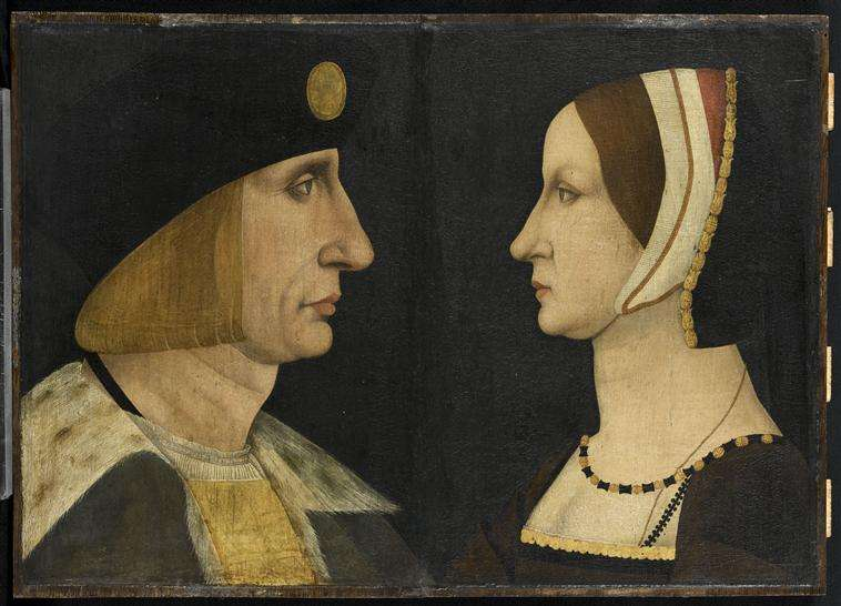 Tableau représentant Louis XII et Anne de Bretagne, Chantilly, musée Condé, XVIe siècle.